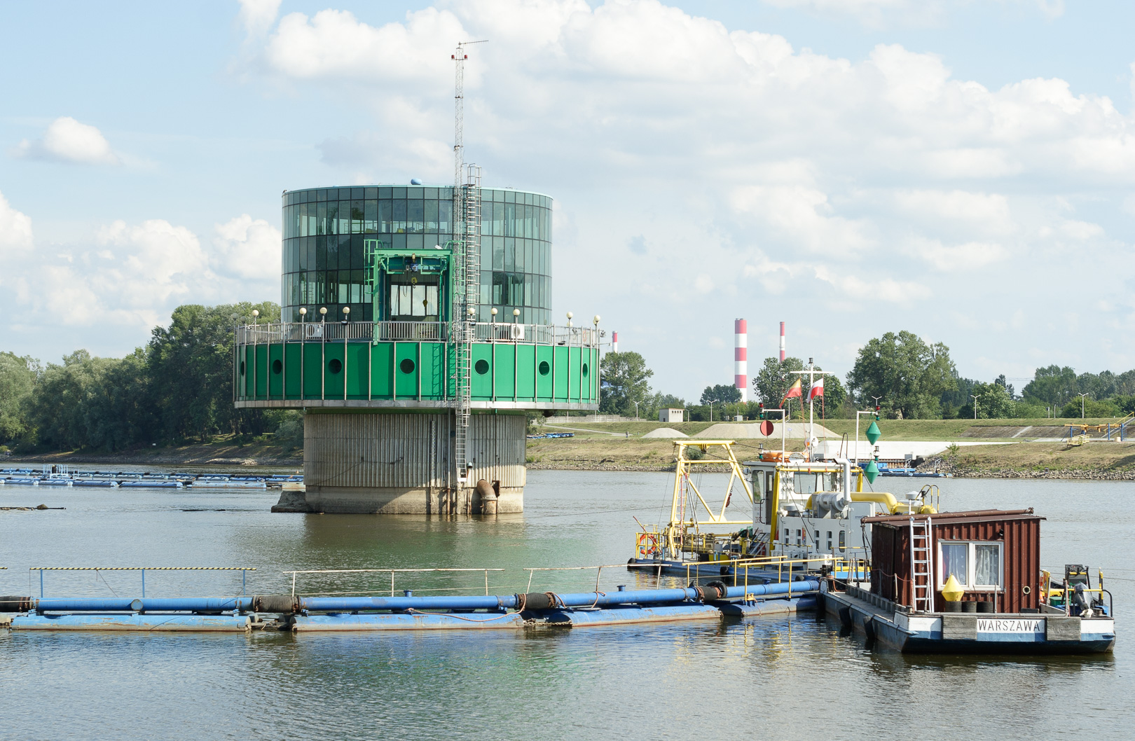 Ujęcie infiltracyjne (studnia) Gruba Kaśka, z prawej strony pogłębiarka (inna niż „Sawa”), w głębi na lewo widoczna trochę pogłębiarka „Sawa”, z prawej strony kominy elektrociepłowni „Siekierki”. This is a photography of Natura 2000 protected area with ID PLB140004